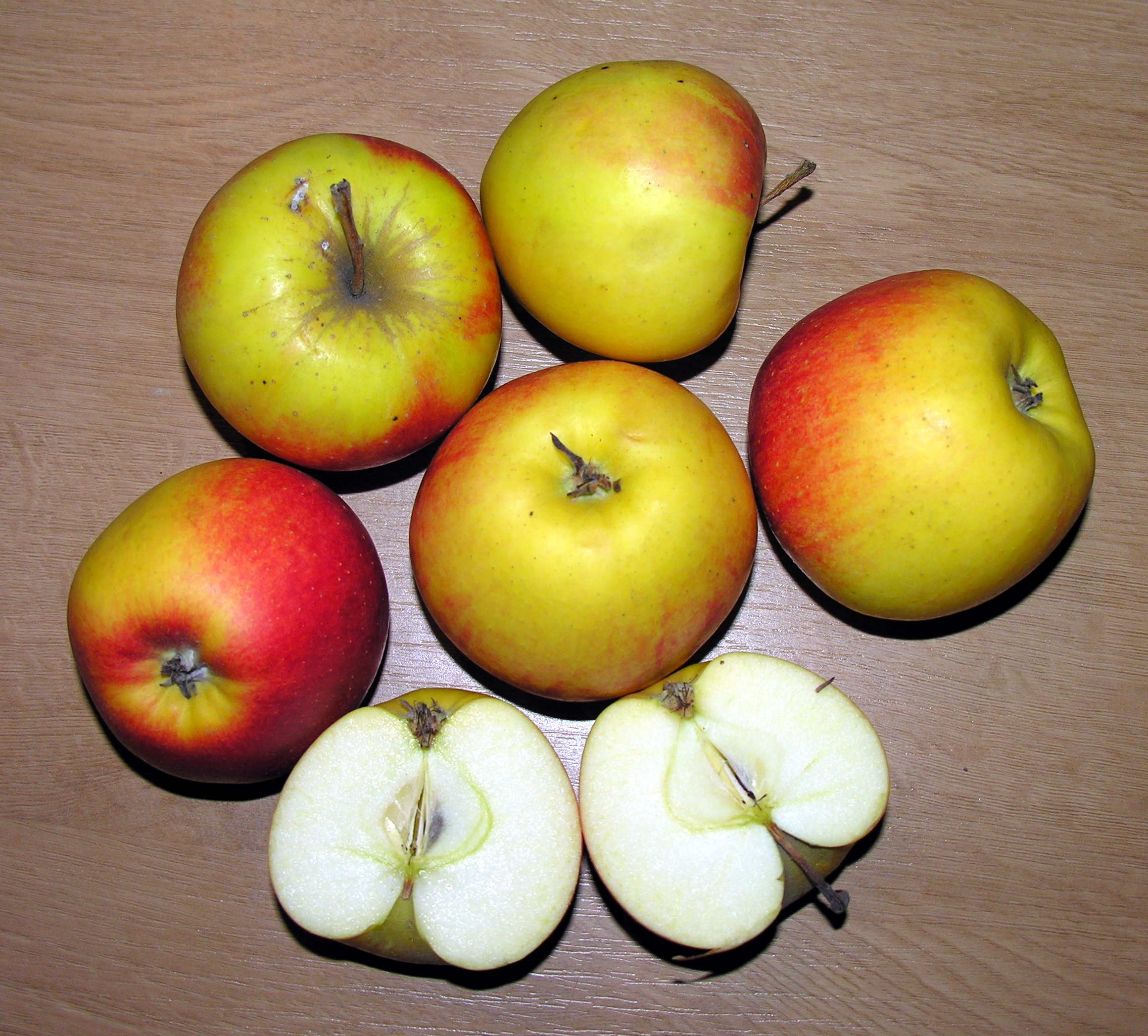 Obelų veislė Lobo 2008 m. gruodžio 17 d.